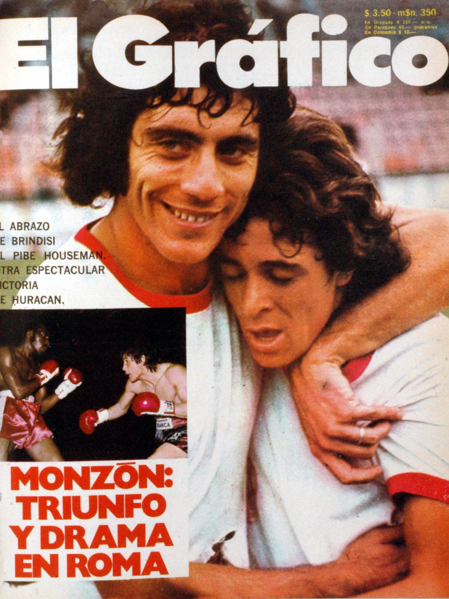 El Grafico del 08 de Mayo de 1973. Edicion 2796